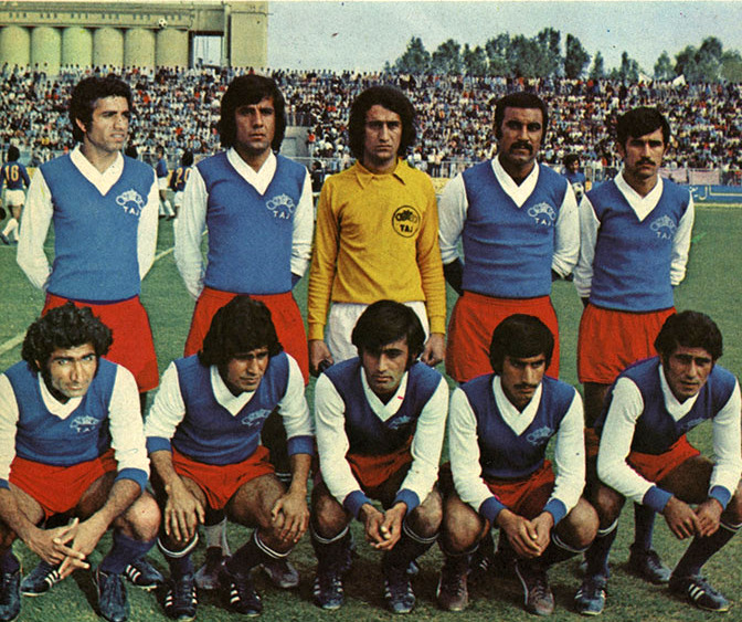 تیم تاج مسجد سلیمان در سال ۱۳۵۲